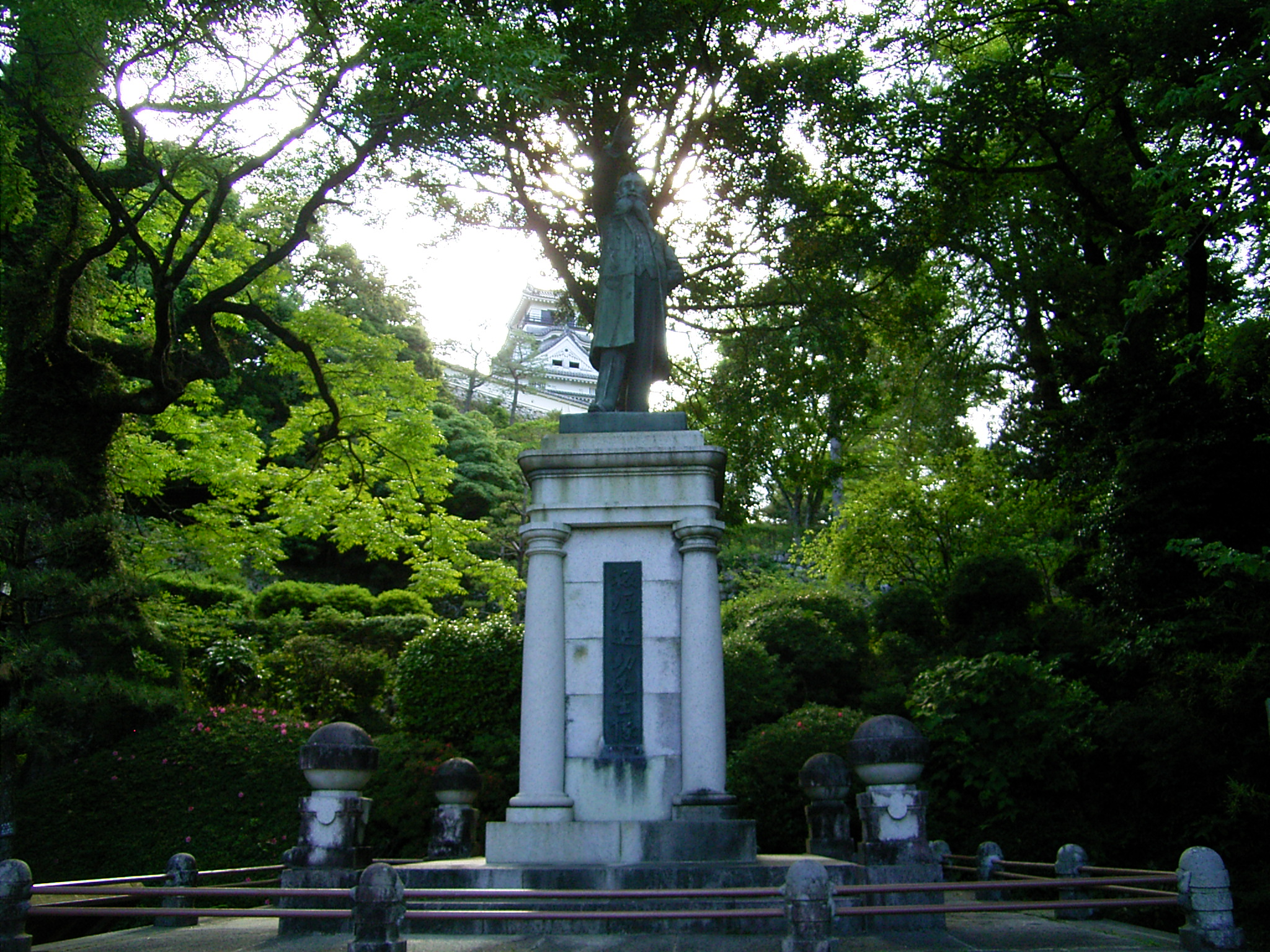 Itagaki_Taisuke(板垣退助)